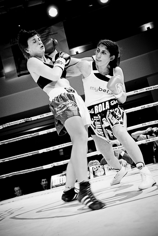 Rola El-Halabi (rechts) am 16. November 2008 beim Finale der Dodge Trophy im Ulmer Blautalcenter gegen Eva Santa (links), Serbin, amtierende WAKO-Weltmeisterin im Kickboxen nach K-1 Regeln.